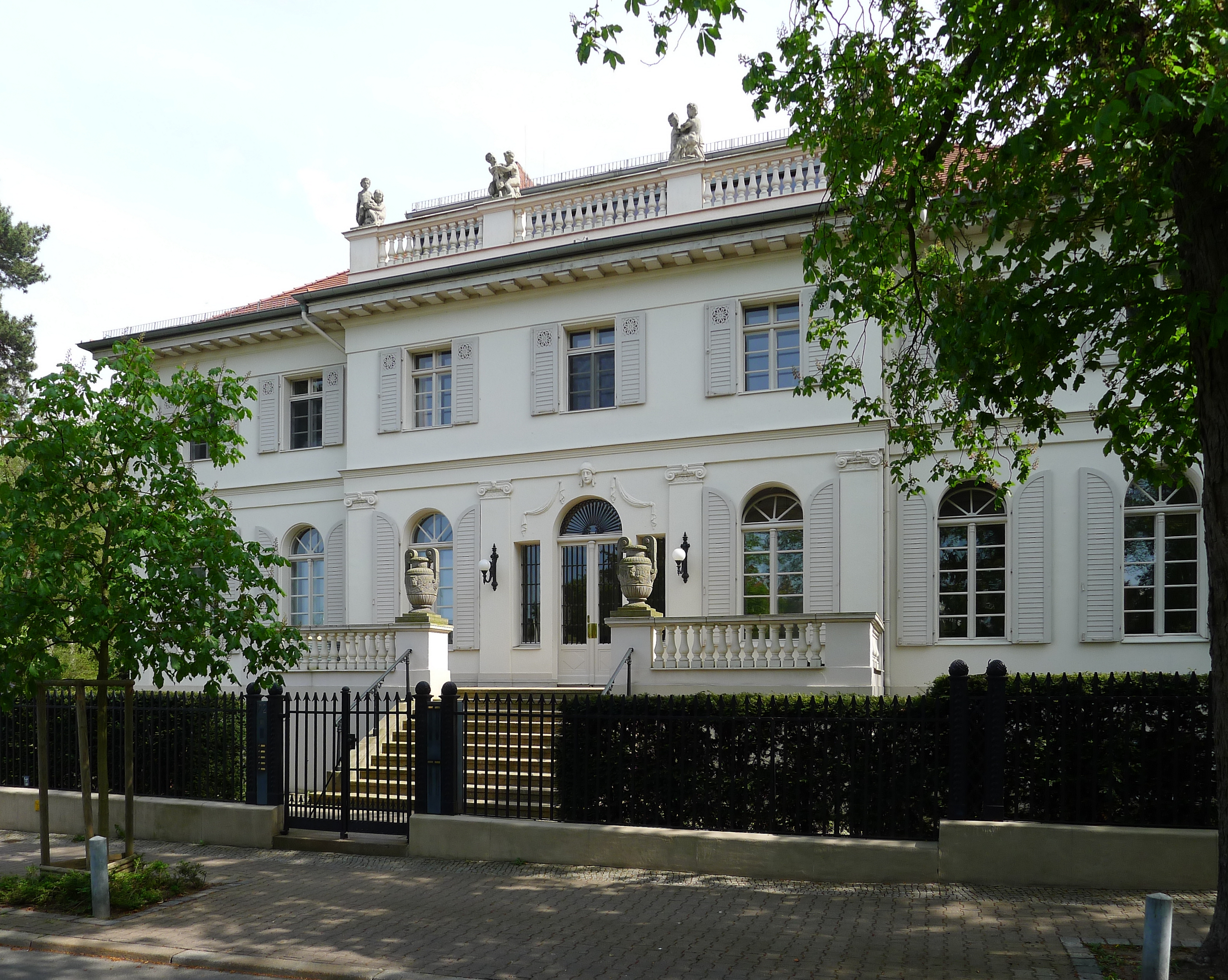 Wohnhaus